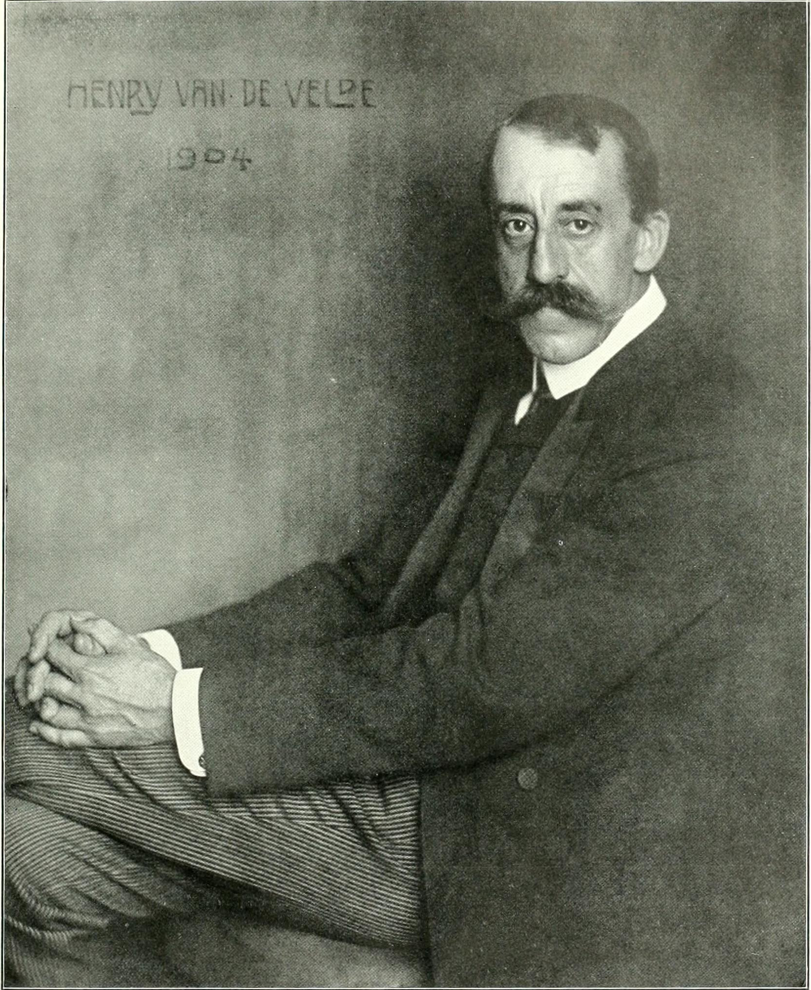 Porträt des Designers Henry van de Velde, 1904.